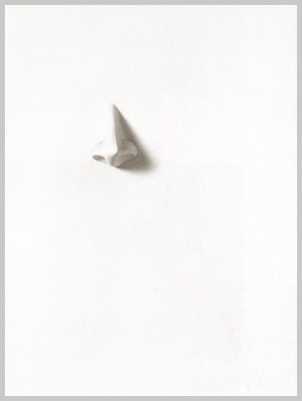 «Сон коллежского асессора». Холст, белила, папье-маше, 75х57